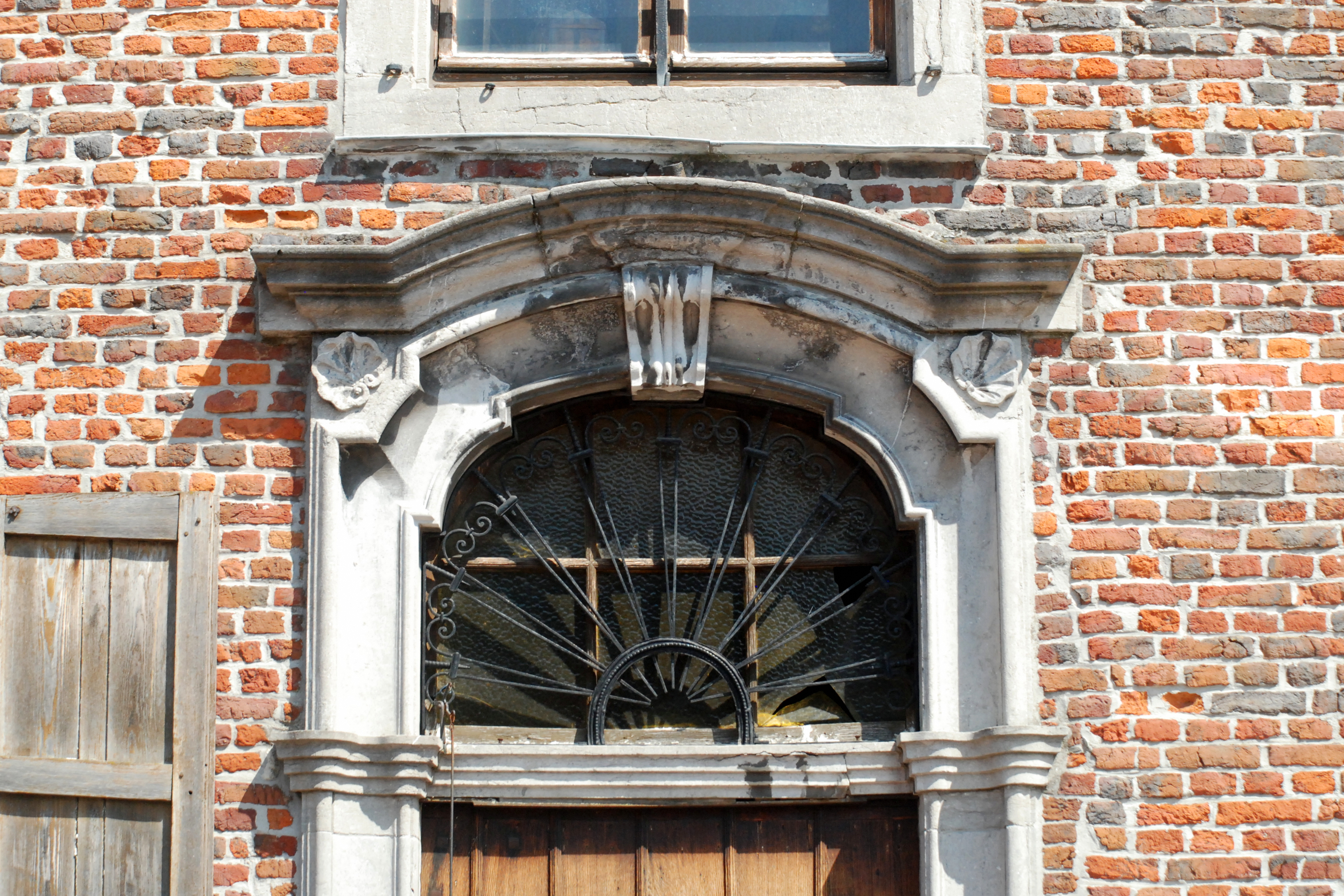 Belgique - Brabant wallon - Genappe - Auberge du Roy d'Espagne - porte de style Louis XV